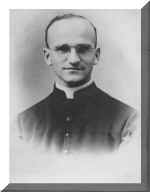 Aurel Lelutiu